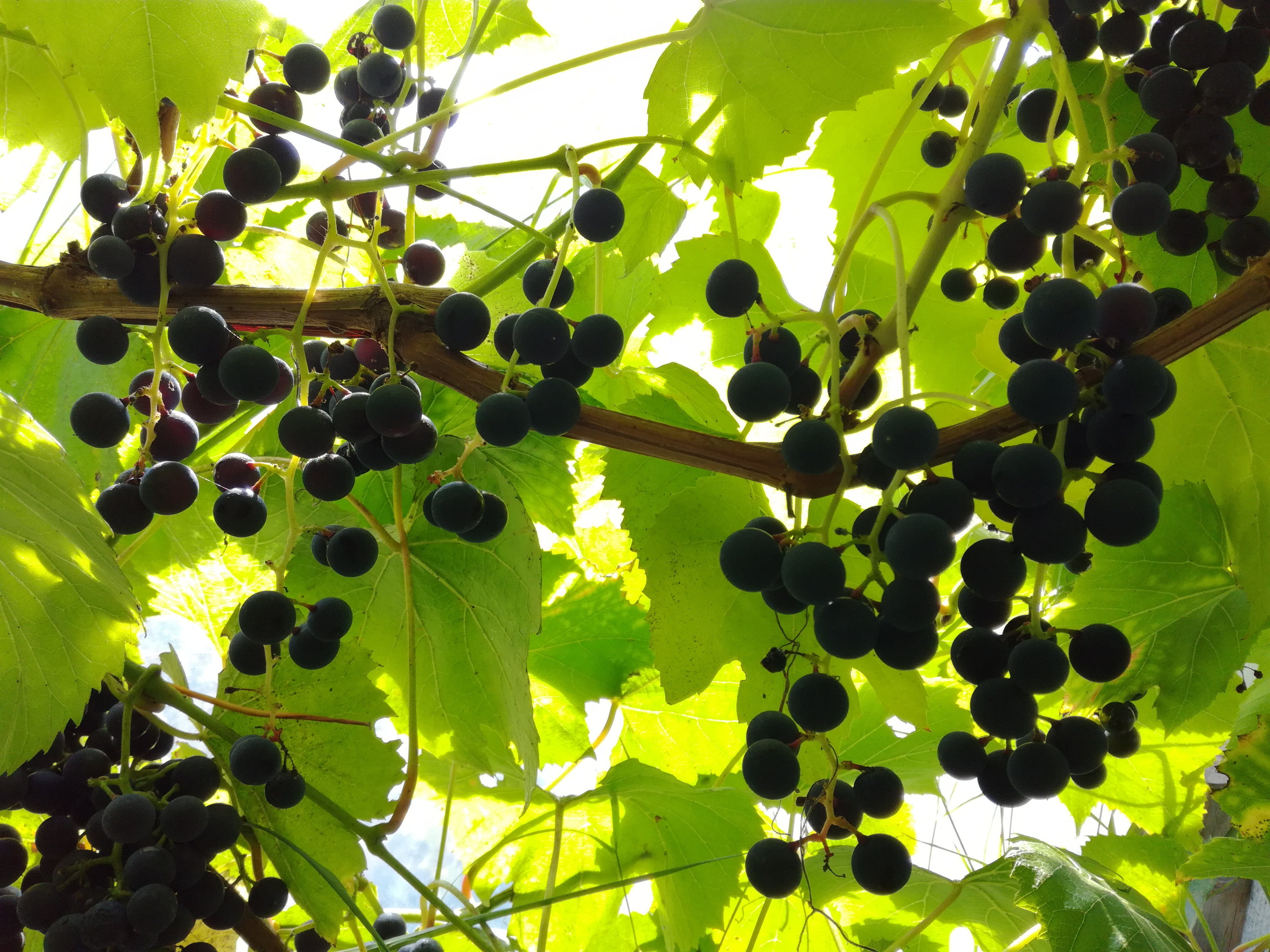 Vitis vinifera x amurensis 'Hasanski Sladki'